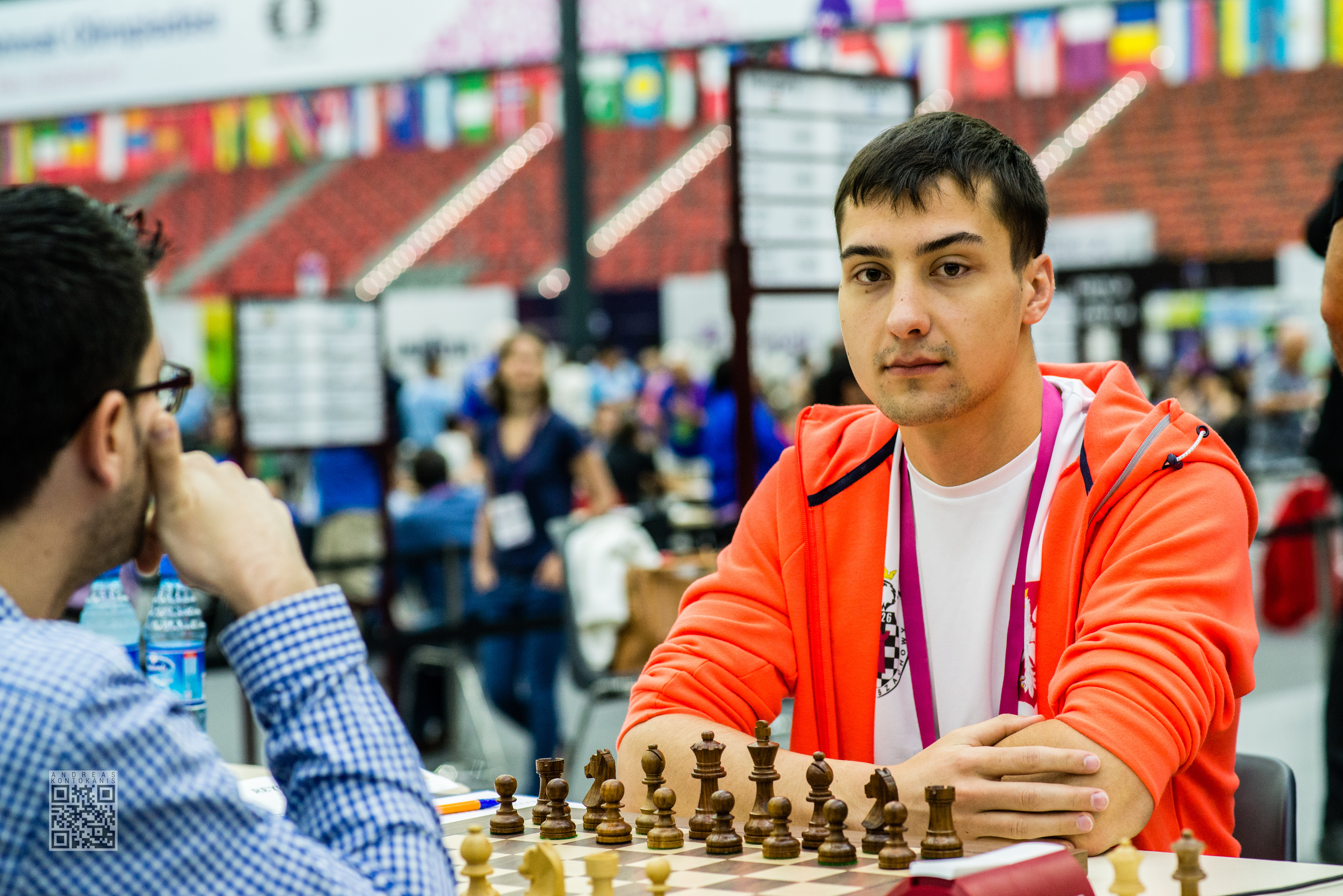 Swiercz Dariusz